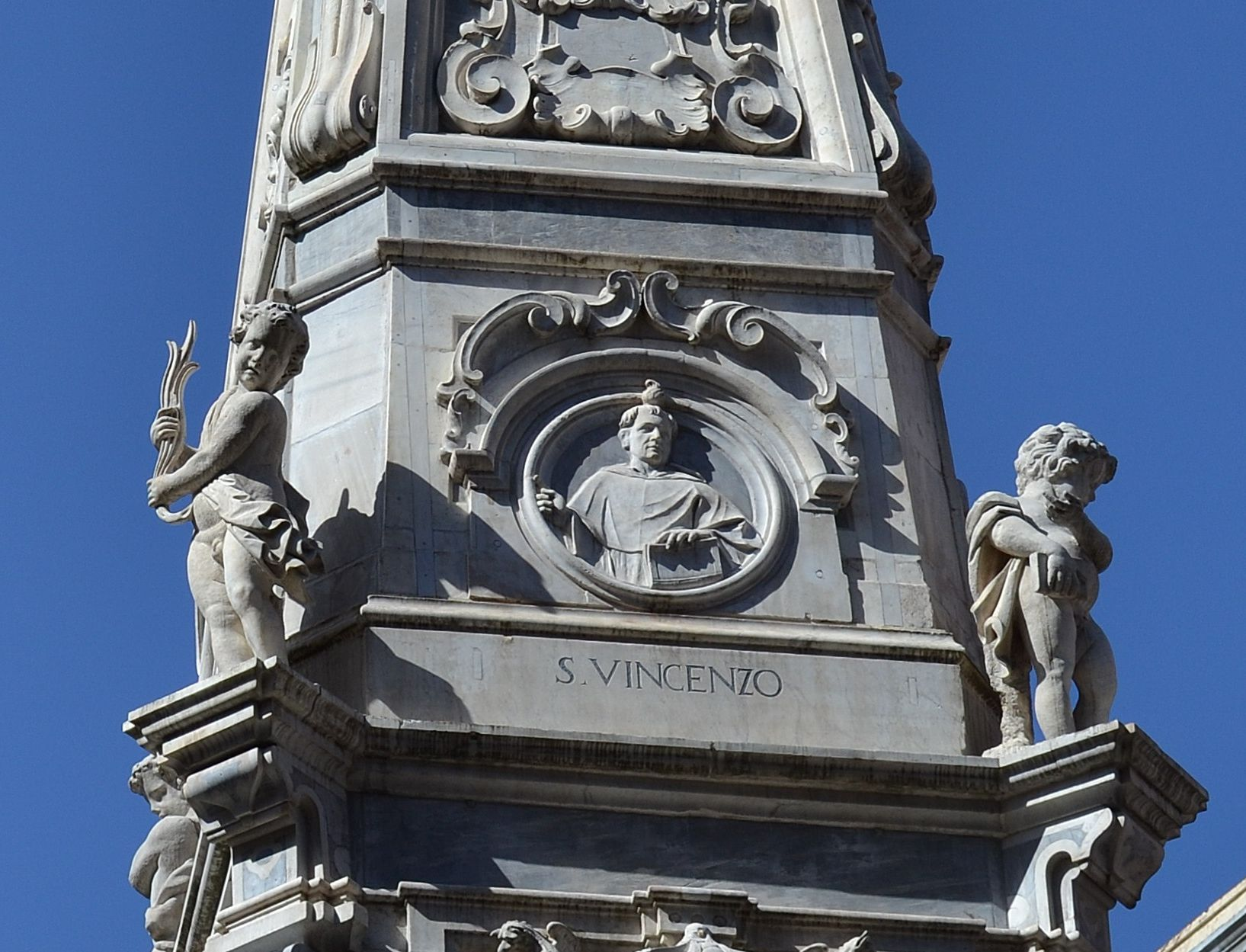 Obelisco di San Domenico Maggiore - Particolare della parte inferiore del terzo ordine, con putti ed il busto di san Vincenzo Ferrer